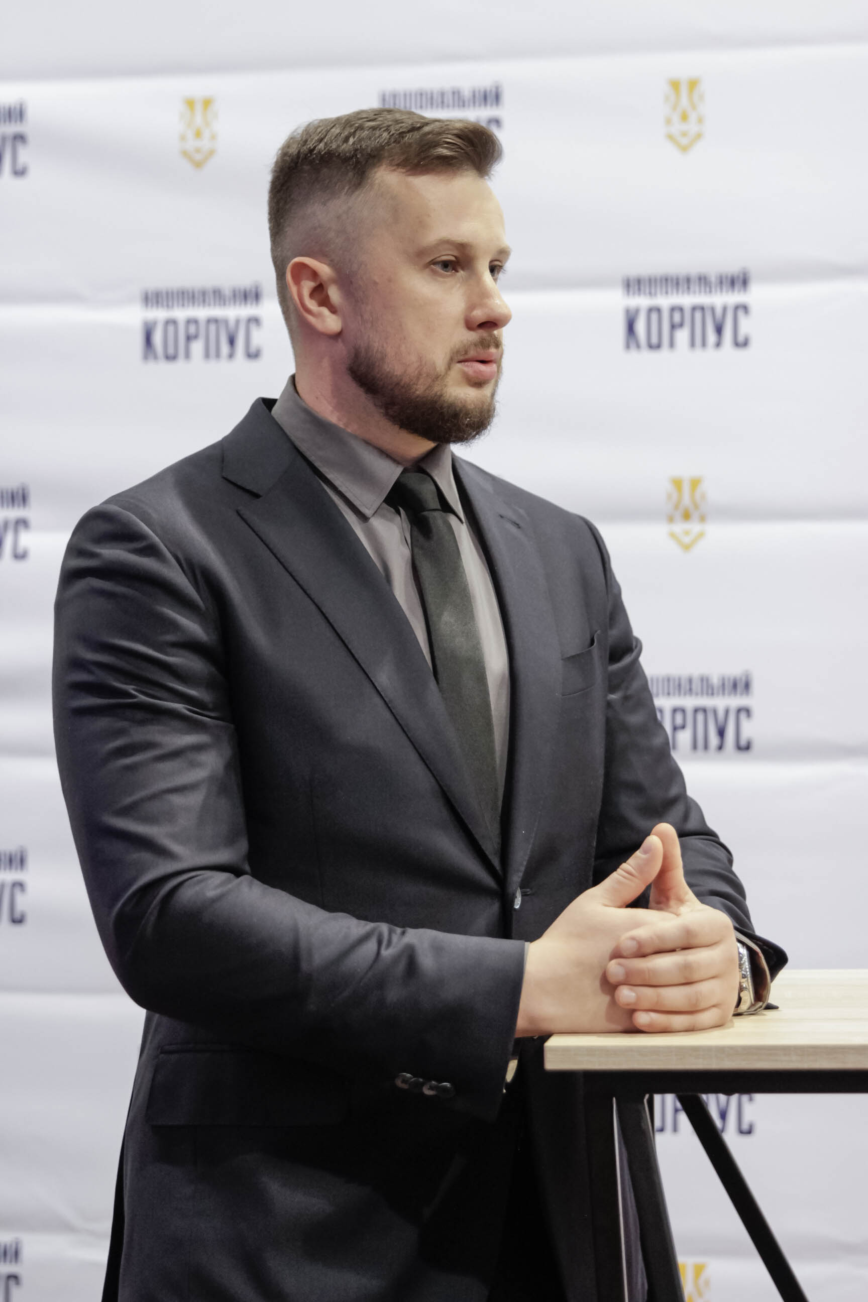 Андрій Білецький на другому з'їзді партії Національний Корпус 14.10.2017